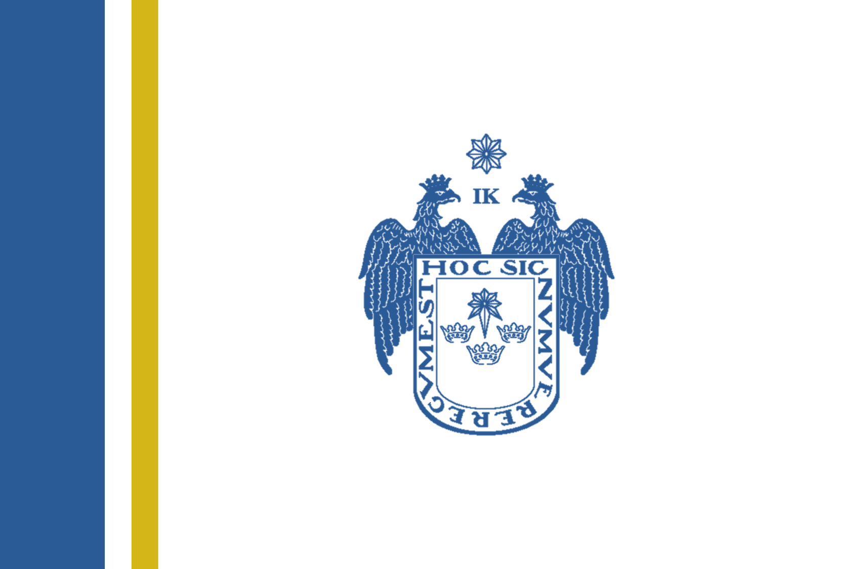 Bandera del distrito de San Juan de Lurigancho, Lima, Perú